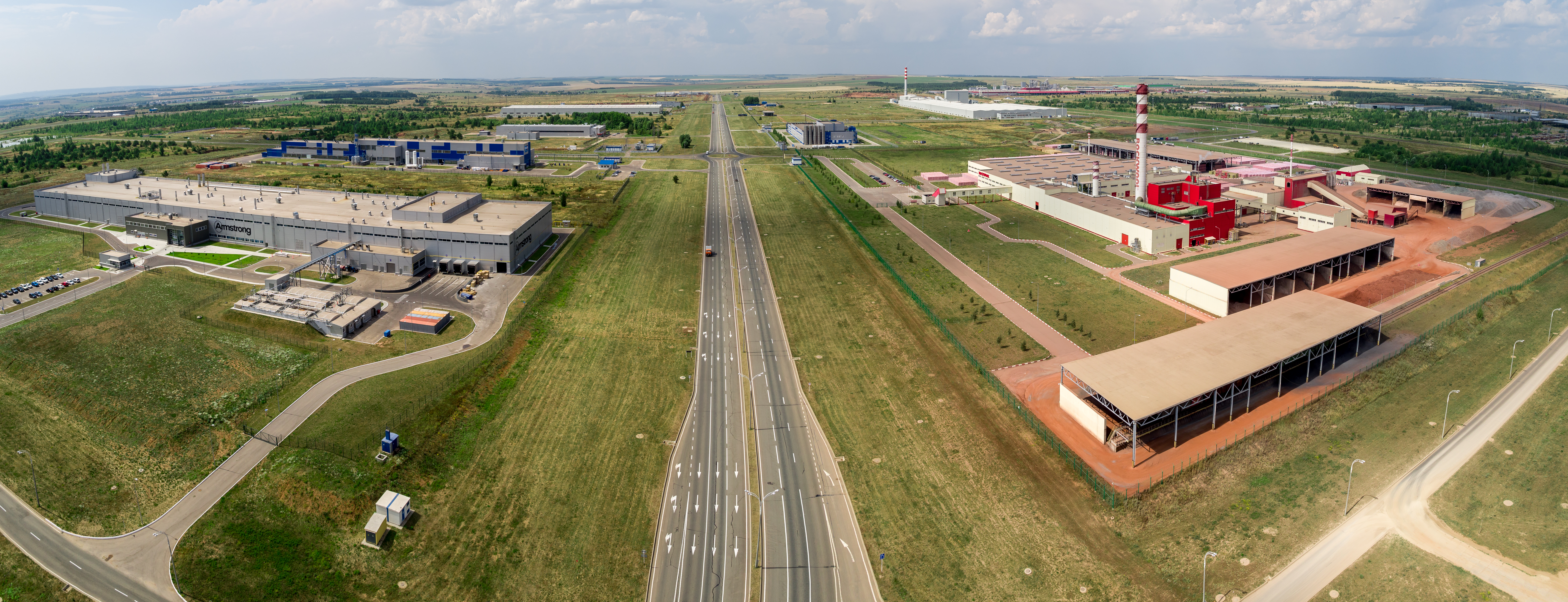 Улица Ш-2 ОЭЗ "Алабуга"